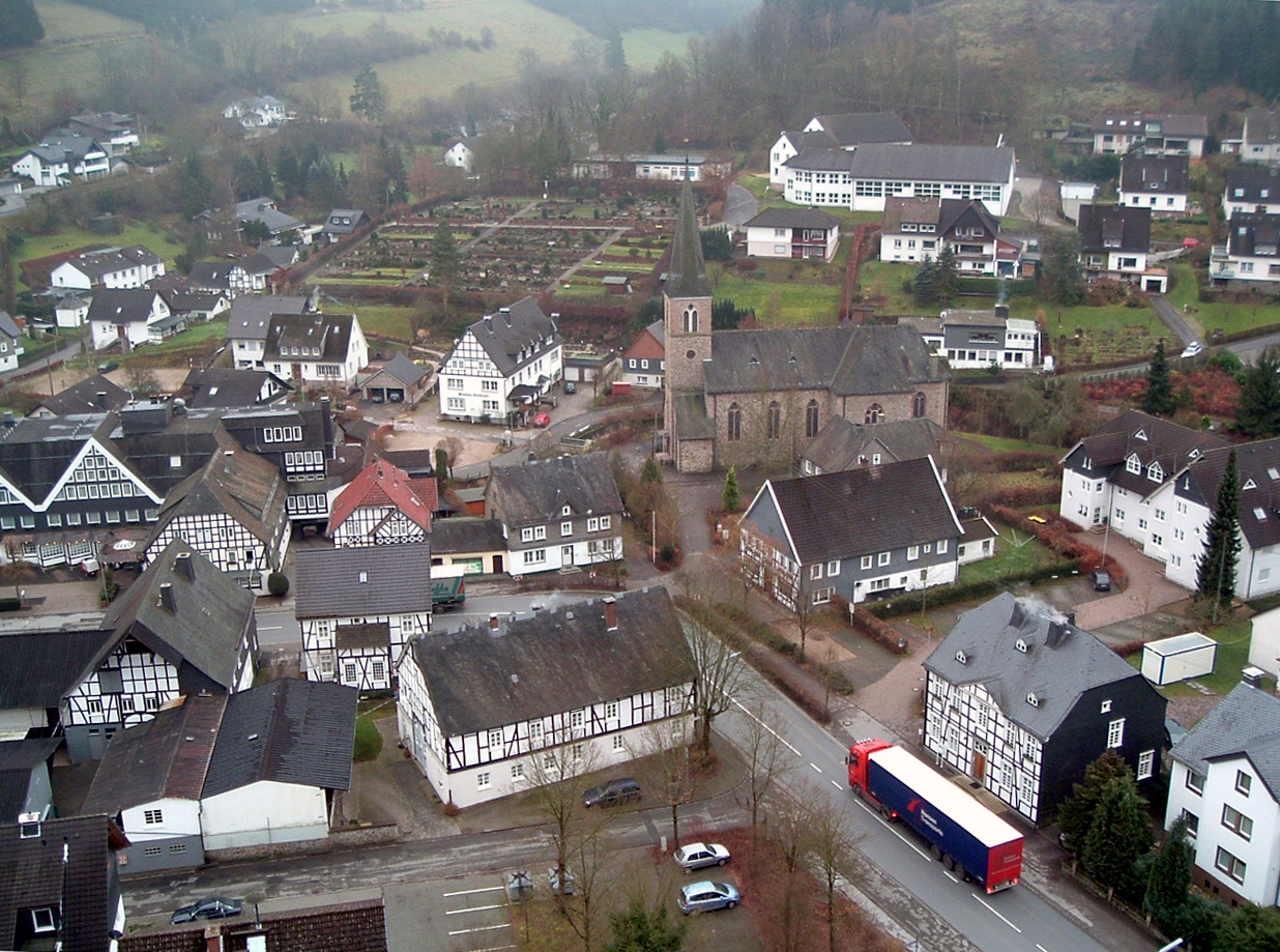 Mittelalterlicher Kern von Bilstein von der Burg Bilstein aus gesehen